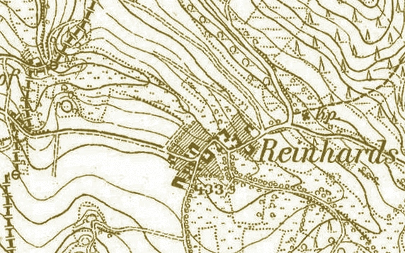 Darstellung der Ortslage von Reinhards im Messtischblatt von 1880.